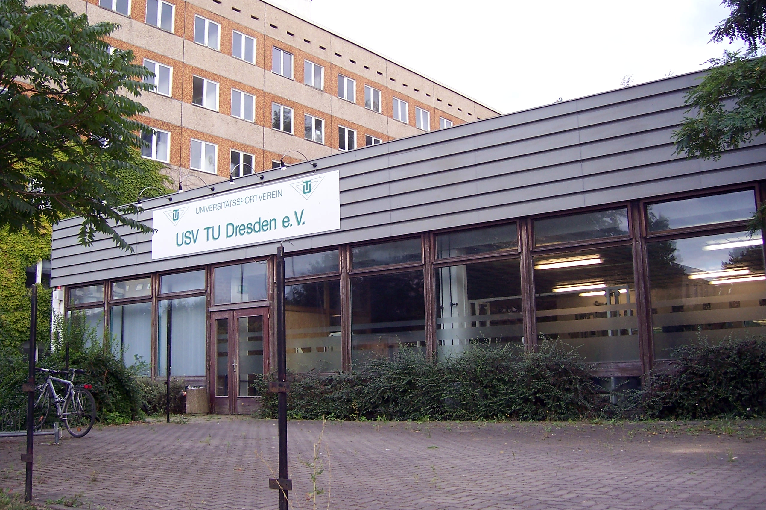 Ehemalige Mensa des SC Einheit Dresden 2009 (zu der Zeit in Nutzung durch den USV der TU Dresden)